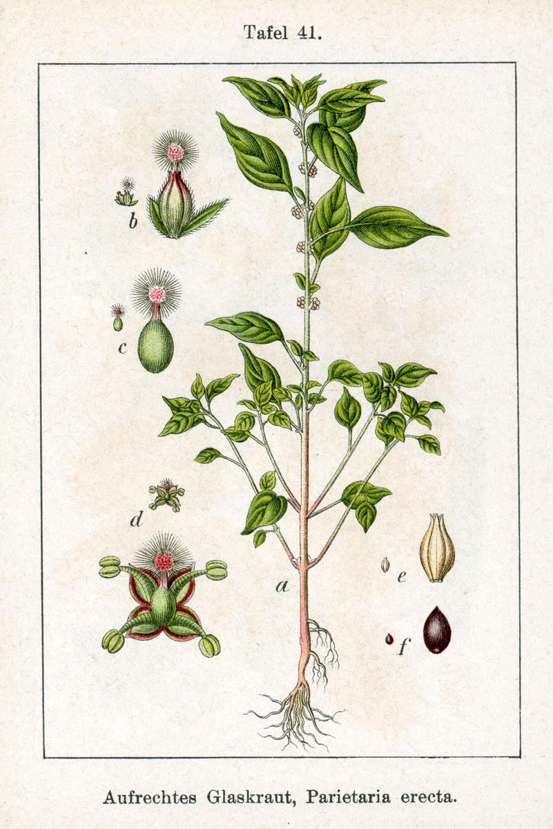 Aufrechtes Glaskraut, Parietaria officinalis L., syn. Parietaria erecta Mert. & W. D. J. Koch Original Description Aufrechtes Glaskraut, Parietaria erecta